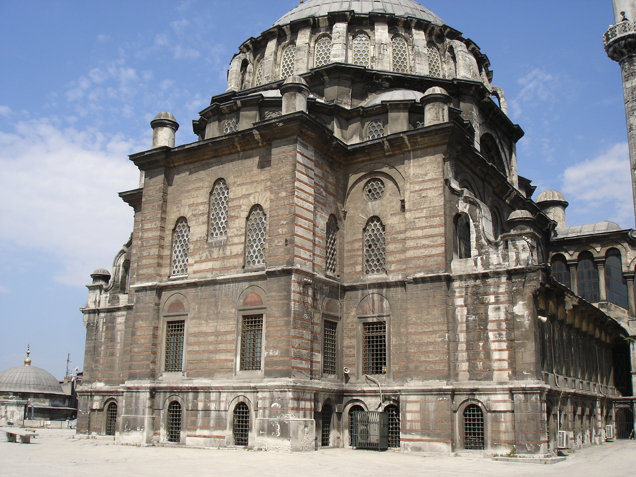 La moschea detta "Laleli camii" ("la moschea dei tulipani"), piccola, ma assai apprezzata per la sua eleganza, ad Istanbul. Foto di: Giovanni Dall'Orto, 29-5-2006.